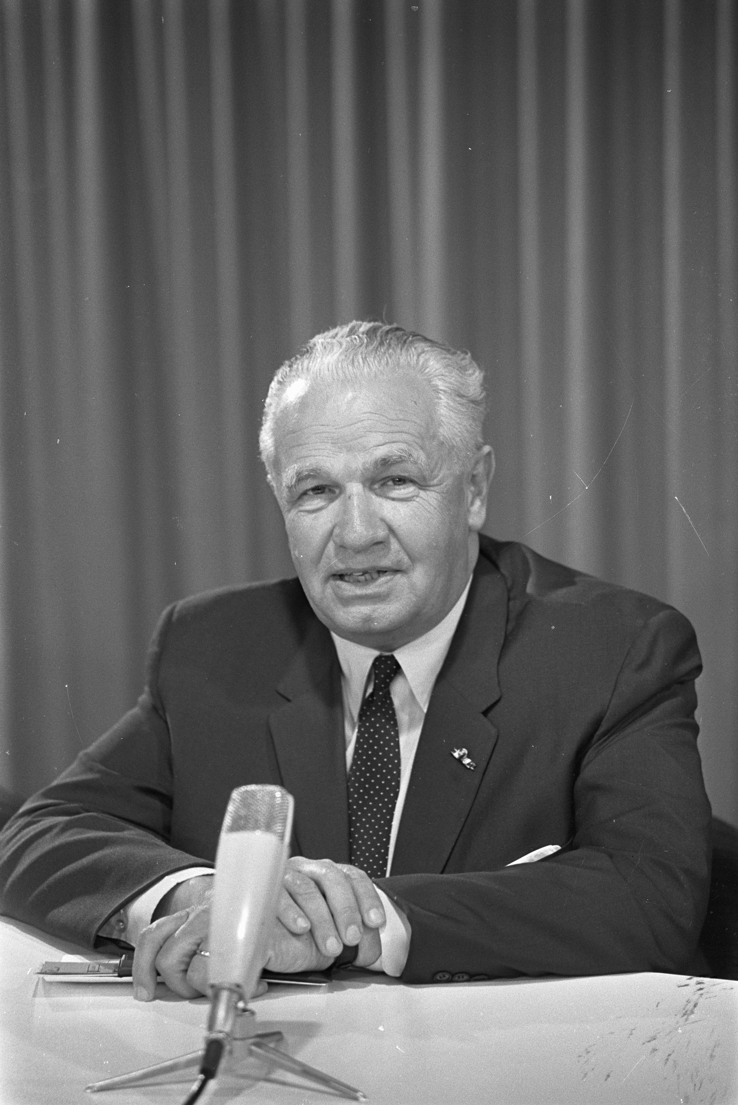 Collectie / Archief : Fotocollectie Anefo Reportage / Serie : Kamerleden naar Indonesië Beschrijving : Mr. van Thiel (voorzitter 2e Kamer) geeft een korte uiteenzetting op Schiphol Datum : 12 augustus 1968 Locatie : Noord-Holland, Schiphol Trefwoorden : kamerleden, portretten Persoonsnaam : Thiel, Mr. F.J.F.M van Fotograaf : Fotograaf Onbekend / Anefo Auteursrechthebbende : Nationaal Archief Materiaalsoort : Negatief (zwart/wit) Nummer archiefinventaris : bekijk toegang 2.24.01.05 Bestanddeelnummer : 921-5896